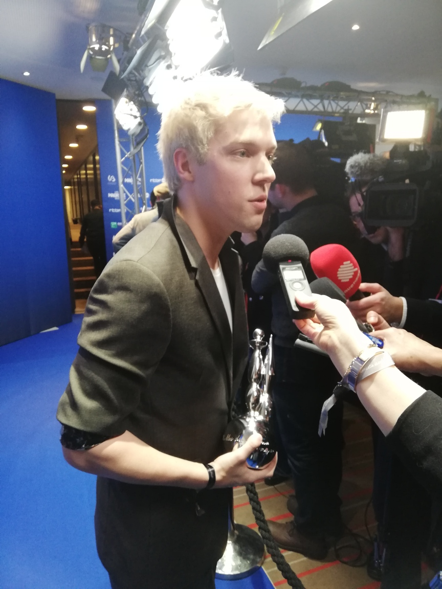 Photo Call Magritte 2019